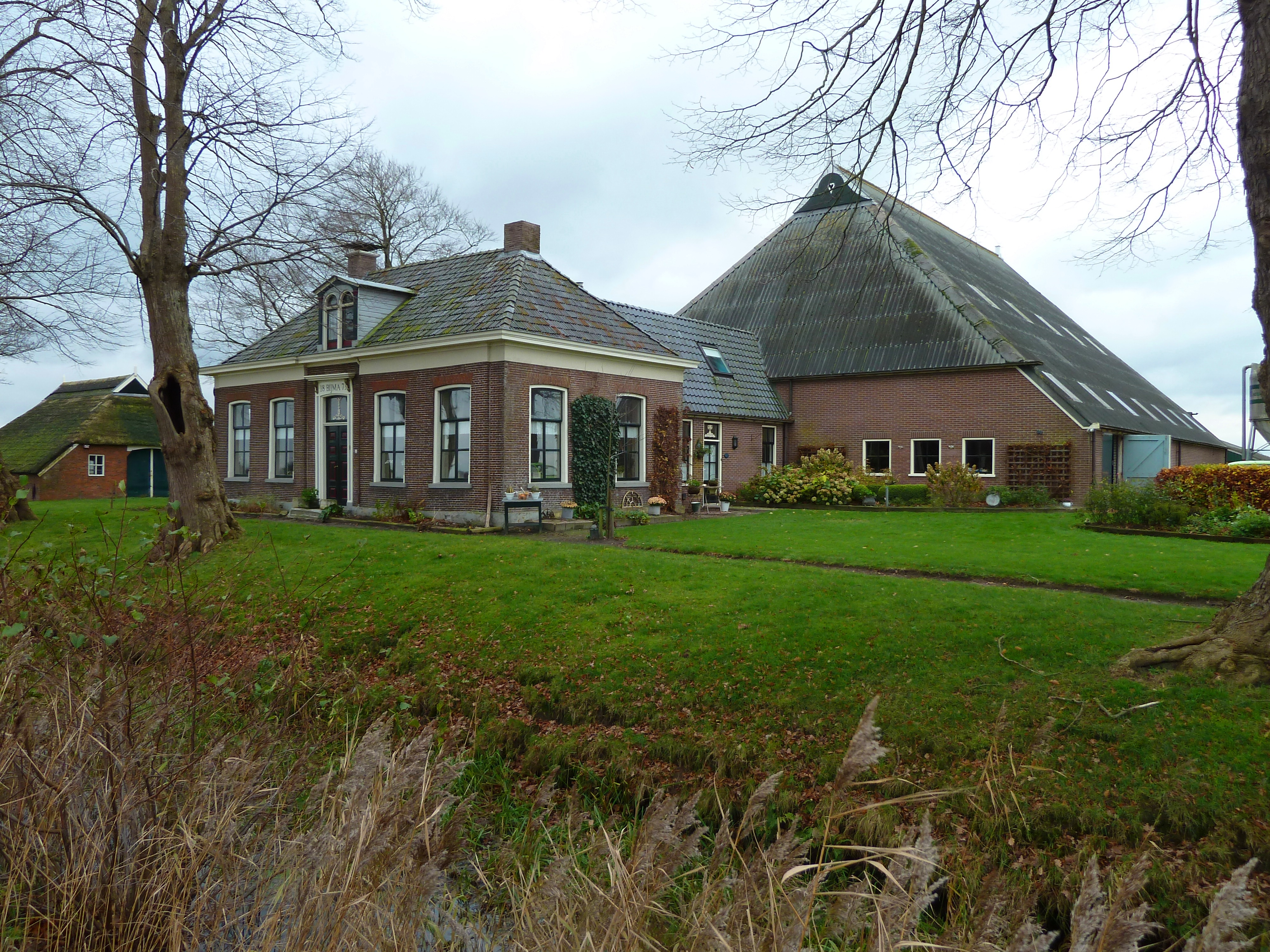 Het tot boerderij verbouwde voormalige schathuis van de Borg Bijma. Op de voorgevel prijkt het jaartal 1873. De borg lag in het veld rechts naast de boerderij. Zie Formsma, p. 104-105.